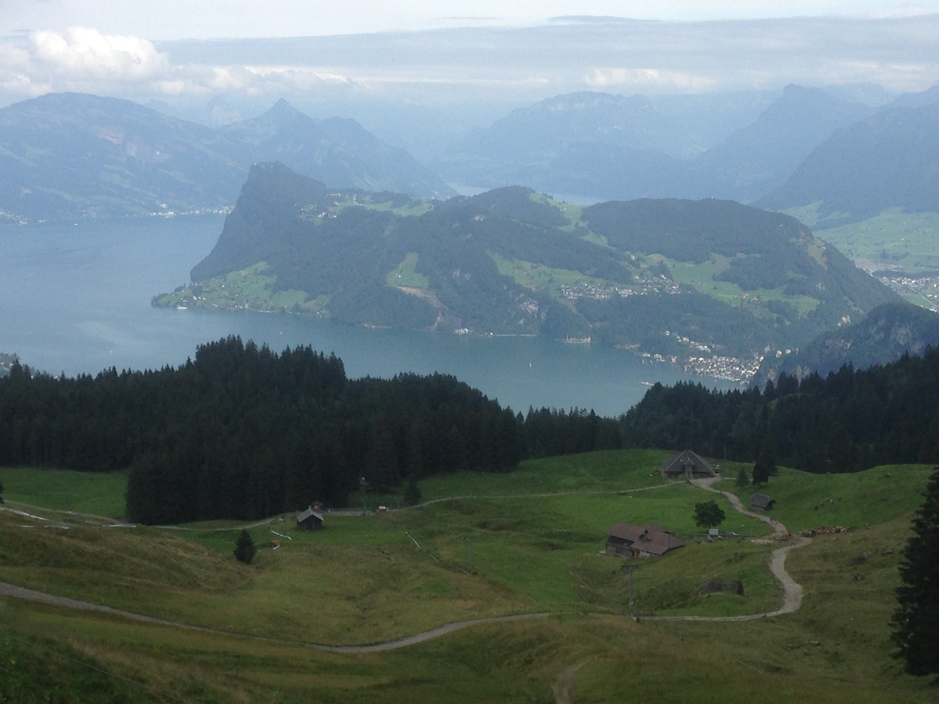 נוף העיר לוצרן